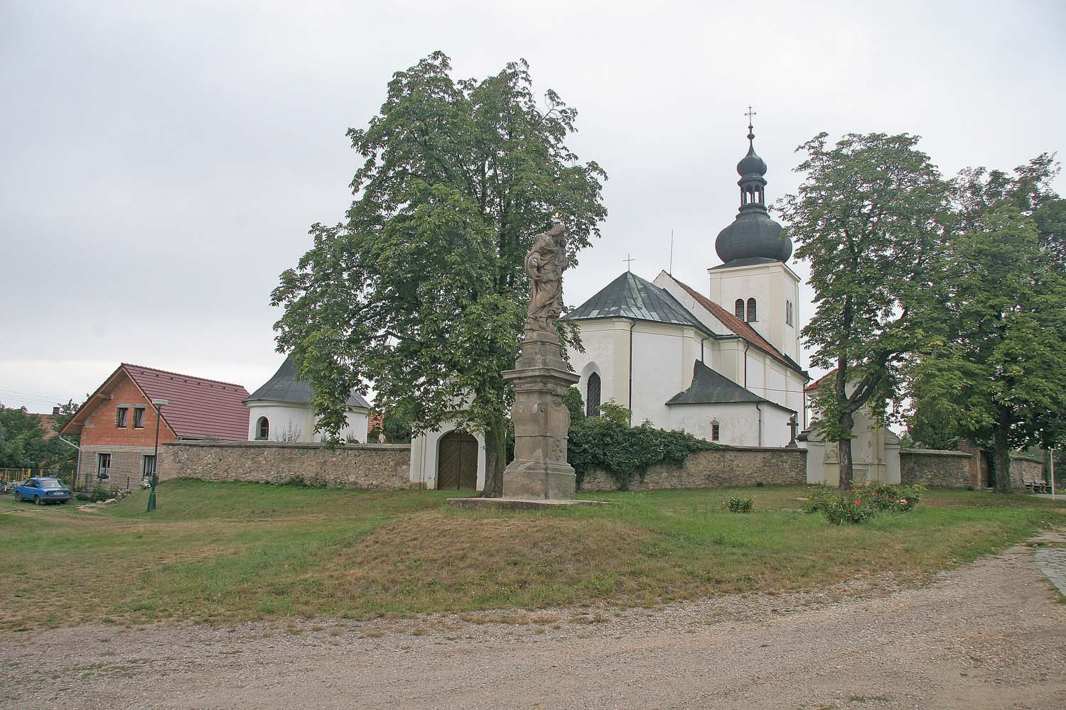 Osice, okres Hradec Králové. Socha sv. Josefa a kostel Nanebevzetí Panny Marie, vlevo na hřbitově márnice.